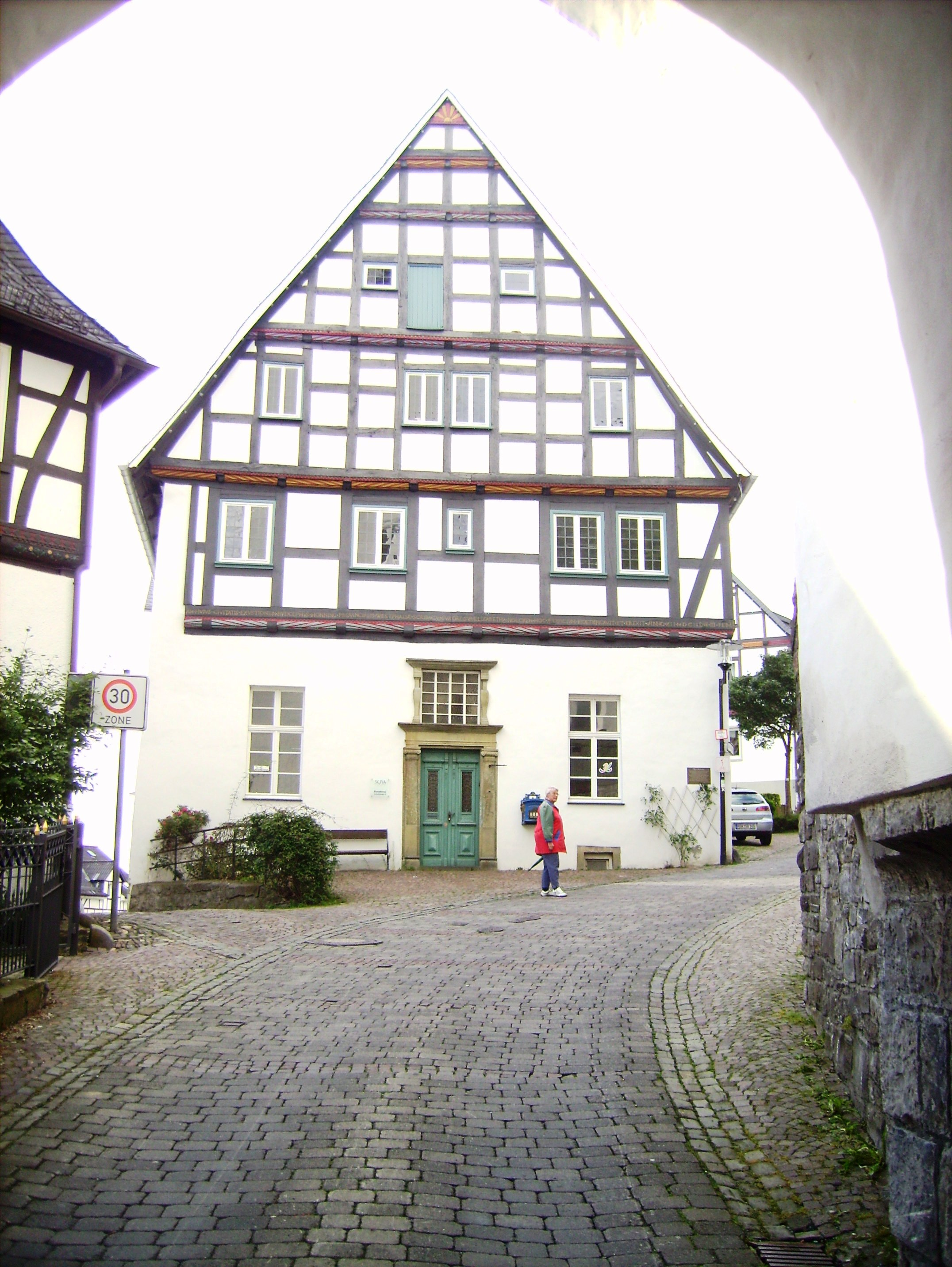 Honningsches Haus, Arnsberg